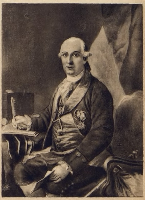 Claude Étienne Le Bauld de Nans (unknown painter, about 1790)